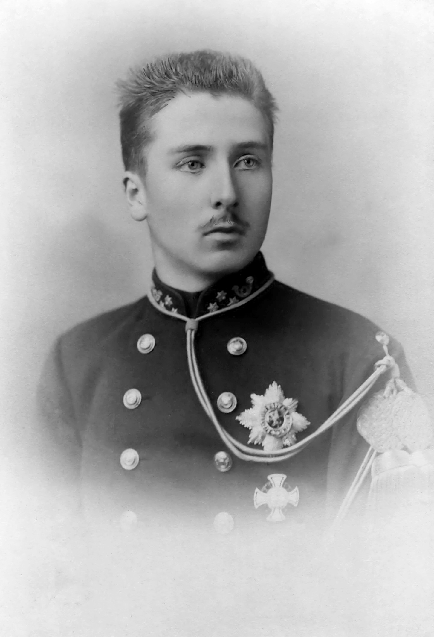 Le prince Baudouin en grande tenue du Régiment des Carabiniers - Photo de Jean Günther, Bruxelles, septembre 1889.